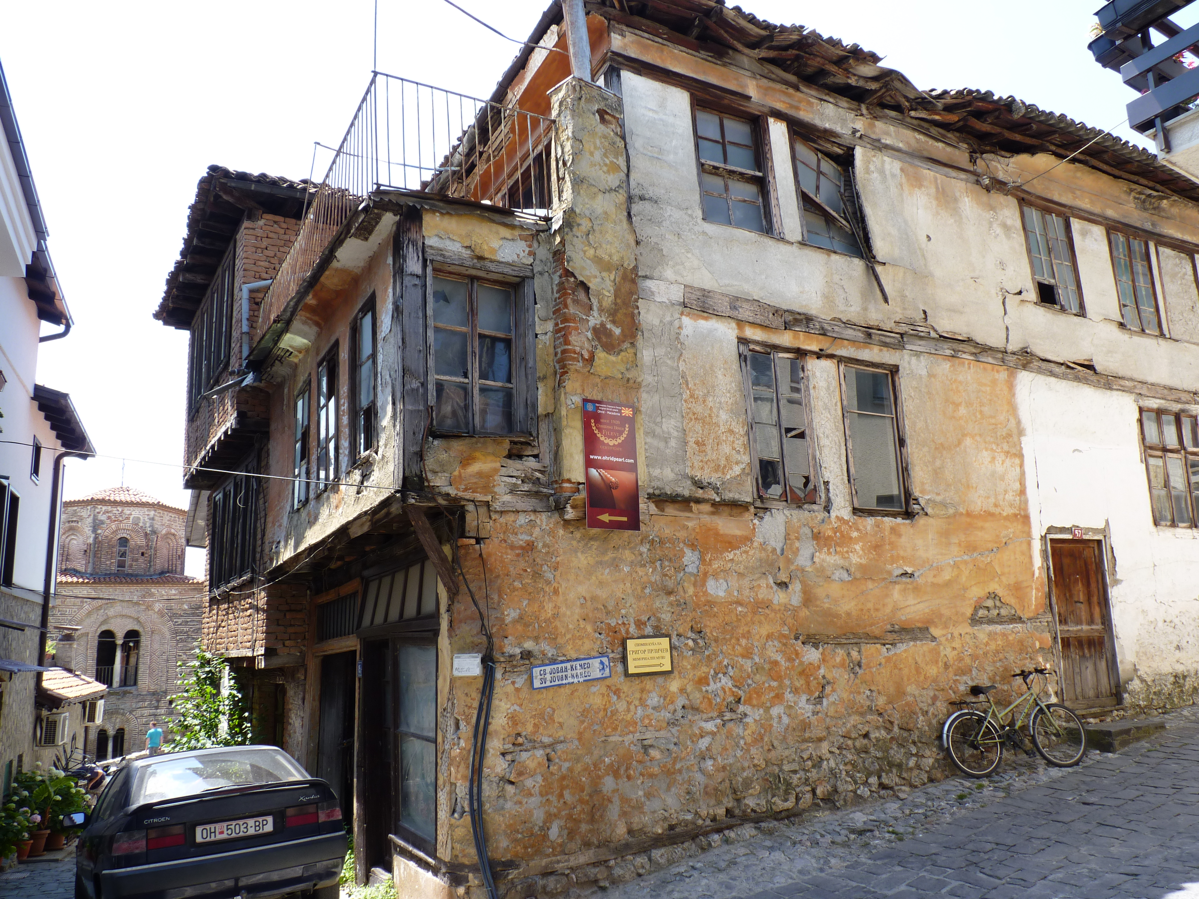 Ohrid